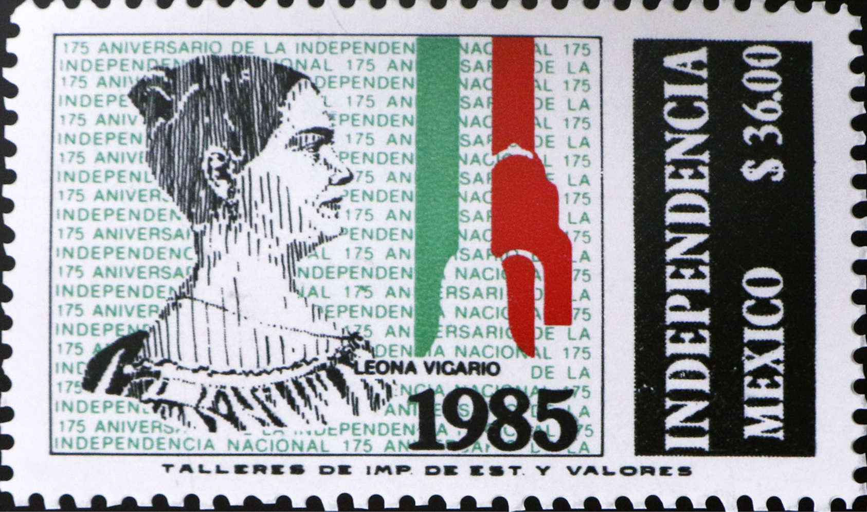 Martes 4 de febrero de 2020. En la Galería Abierta de las Rejas de Chapultepec, se encuentra la exposición Forjadoras de la patria, Leona Vicario; como parte de las actividades del Año 2020 dedicado a la llamada Madre de la Patria. Fotografía: Tania Victoria / Secretaría de Cultura de la Ciudad de México.